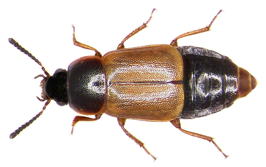 Familie: Staphylinidae Groesse: 3-4 mm Verbreitung: Europe Ökologie: an Saftflüssen und faulenden Stoffen, Gebirgstier Fundort: Germania, Bayern, Oberfranken, Wunsiedel leg.det. G.Rößler, 1988 Photo: U.Schmidt, 2005